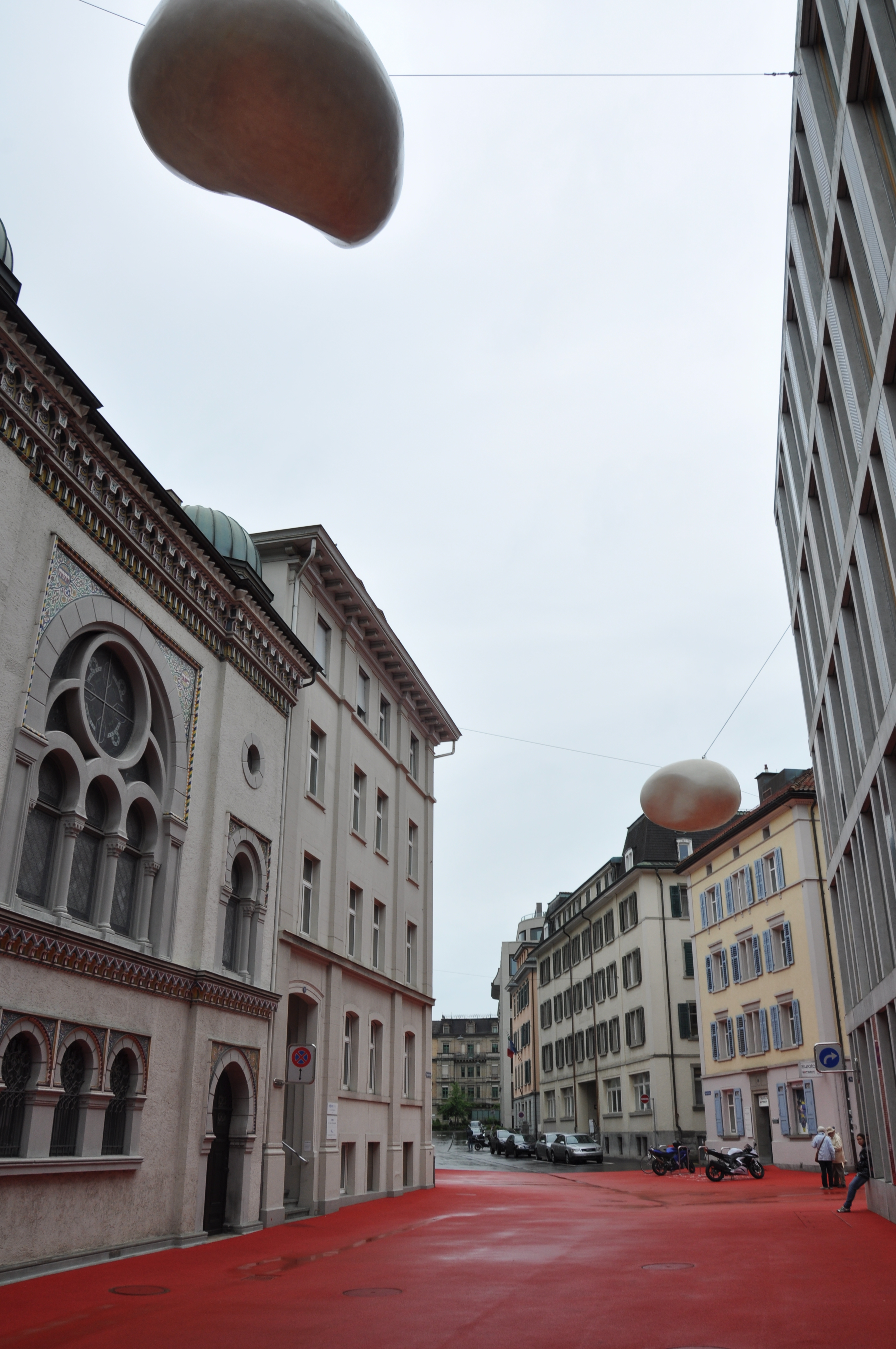 St. Gallen, "Stadtlounge"